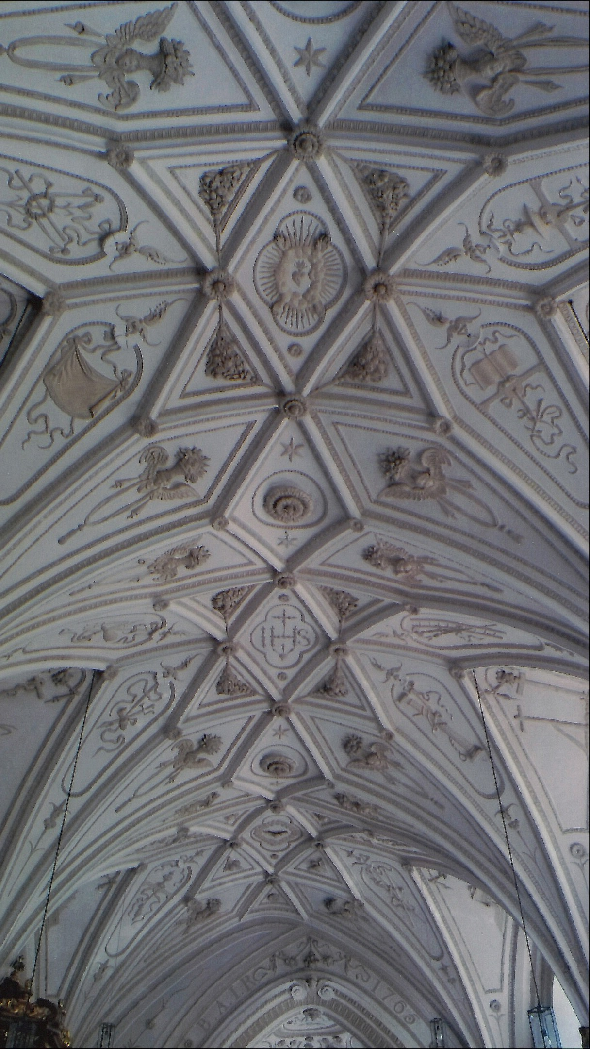 Feldkirchen (Rott am Inn), Filialkirche Unsere Liebe Frau, Langhaus-Gewölbestuck mit Eierstäben, Girlanden, Festons, Vasen und geflügelten Enkelsköpfen sowie zahlreiche Stuckreliefs zu Bildern aus der Lauretanischen Litanei, 1630.